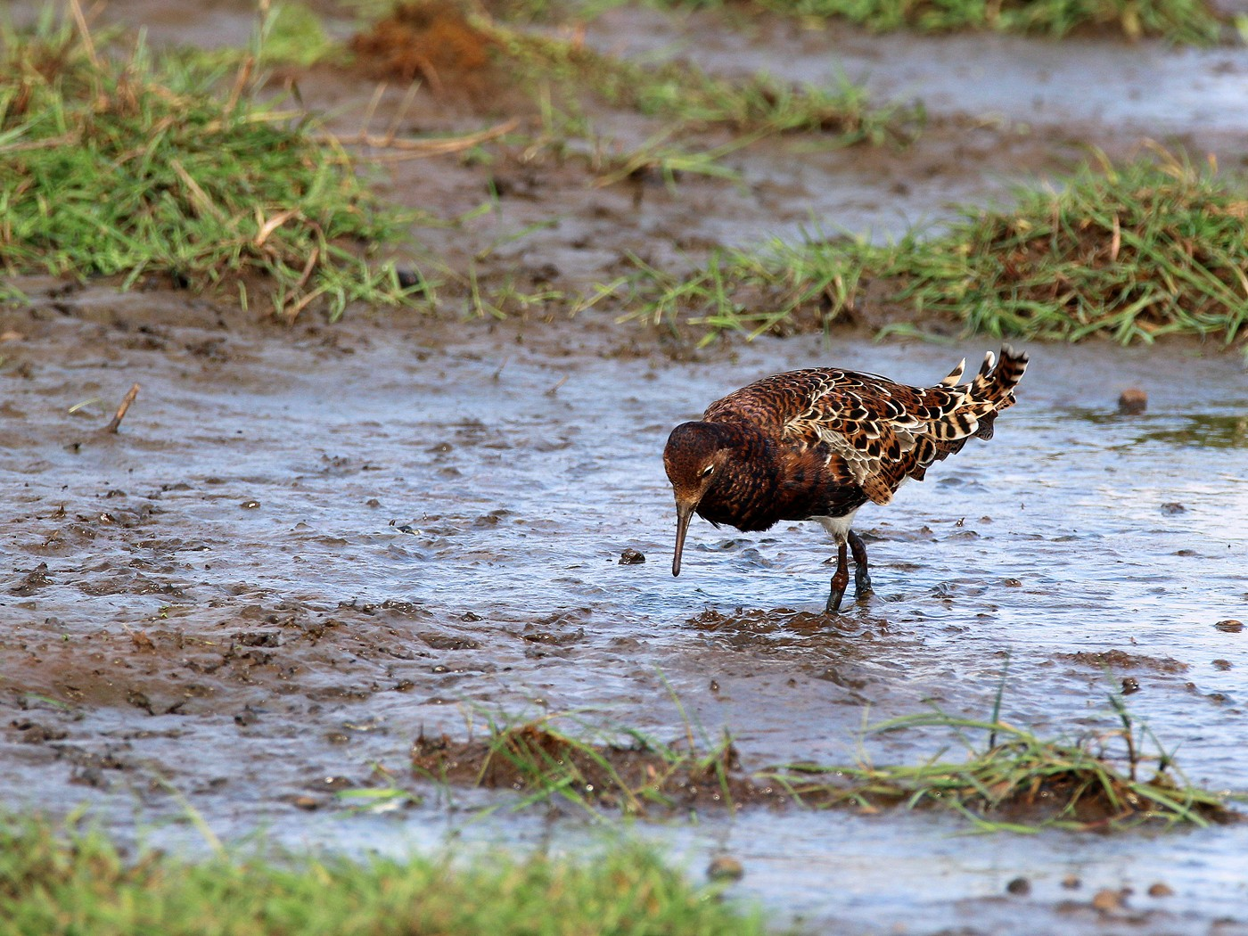 Kampfläufer im südlichen Mecklenburg